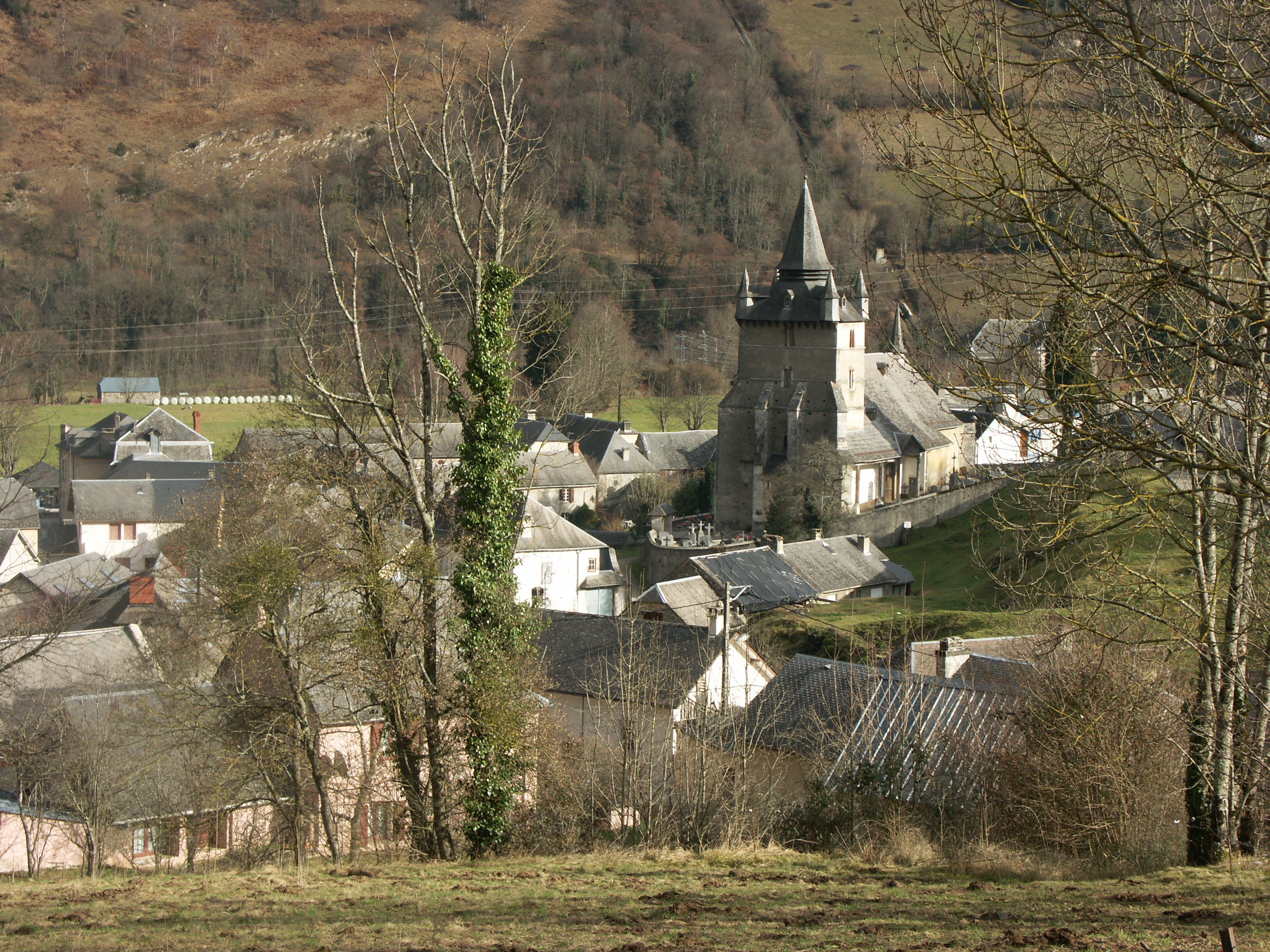 Beaudéan et l'église Saint-Martin